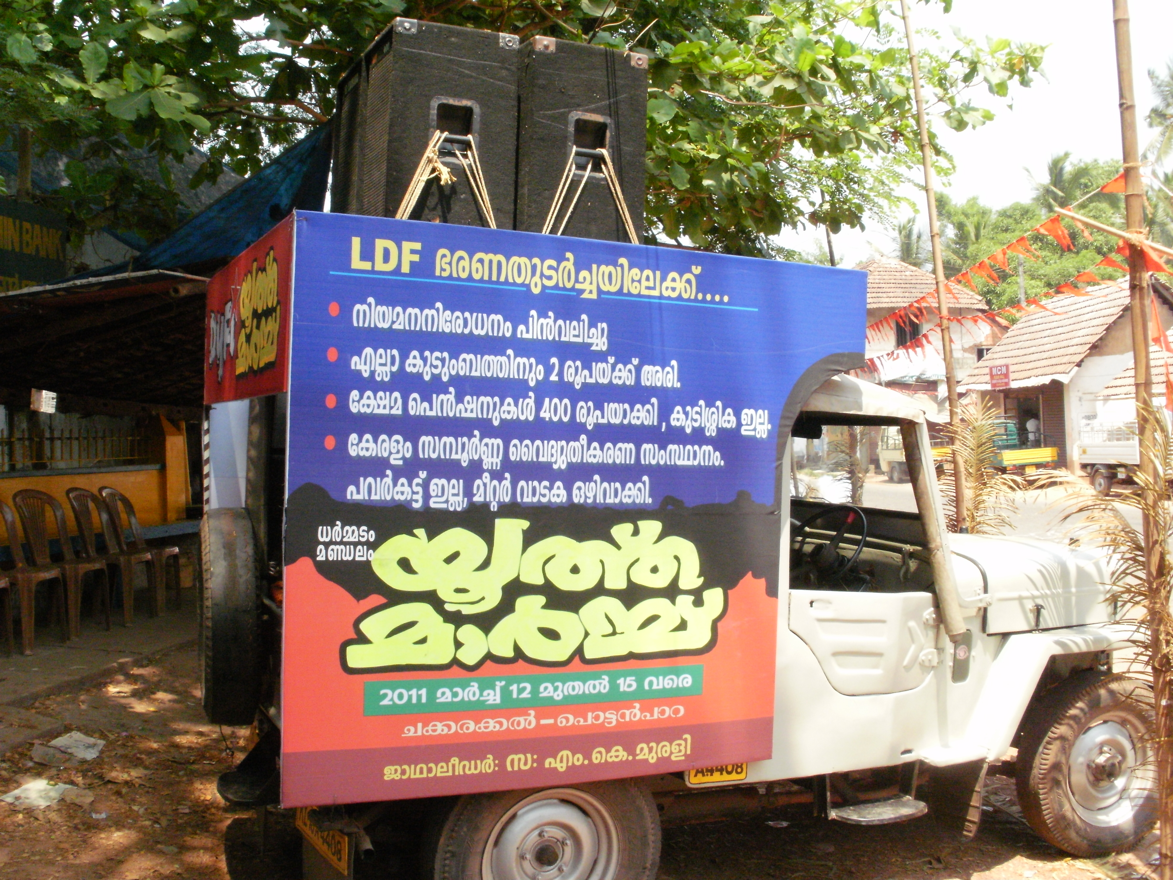 ഡി‌വൈ‌എഫ്‌ഐയുടെ ഒരു സമര പ്രചരണം